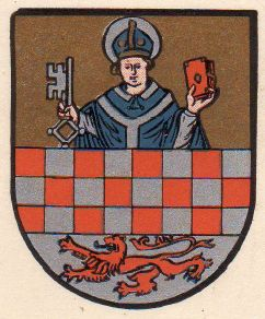 Wappen von Röhnsahl mit dem heiligen Servatius